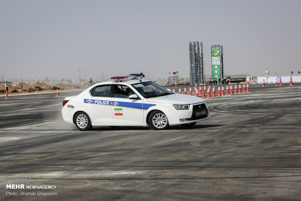 نیروهای پلیس ایران در افتتاحیه مسابقات بین‌المللی گشت جاده‌ای